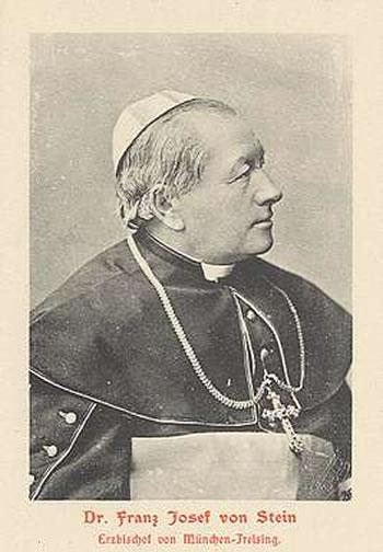 Bischof Franz Joseph von Stein